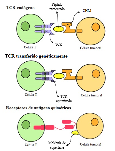 Diferentes TCR desarrollados para inmunoterapias con células T. El TCR endógeno normalmente tiene baja afinidad y reconoce el péptido tumoral en contexto de CMH. Los TCR modificados genéticamente tienen afinidades más altas. Receptores quiméricos pueden reconocer cualquier molécula de superficie a través del uso de anticuerpos como dominios de reconocimiento